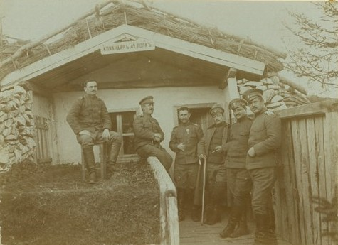 Офицери пред щаба на 45-и пехотен полк на височината Рударски колиби при завоя на р. Черна в Македония.